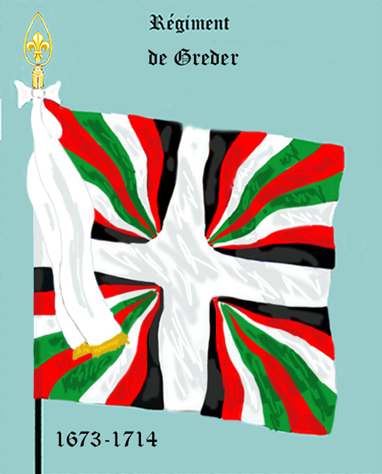 Ordonnanzfahne eines Fremdenregiments im königlich französischen Dienst. (Schweizer Regiment) - Entnommen und überarbeitet aus: „LES UNIFORMES ET LES DRAPEAUX DE L'ARMÉE DU ROI“ Marseille 1899. - Drapeau d'Ordonnance d' un régiment étranger au service française (régiment suisse.)